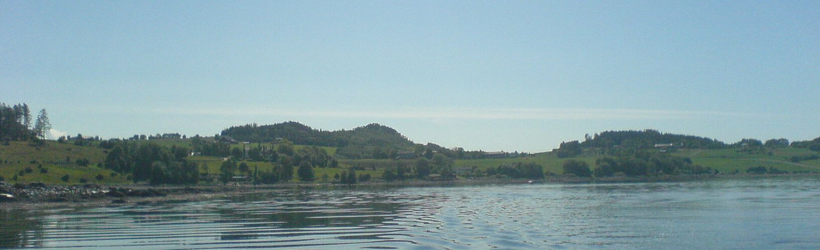 Norsk (bokmål): Deler av Nordbygda på Skatval, med Steinvik og Fløan, sett fra sjøen.